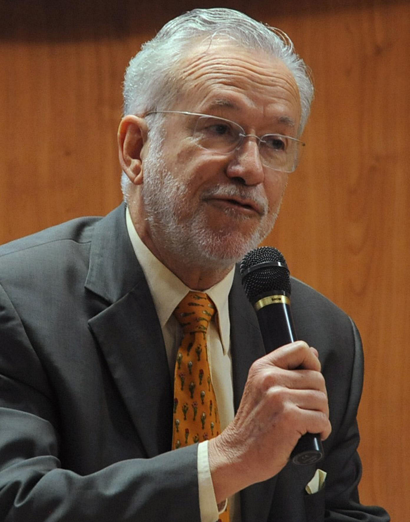 O jornalista Alexandre Garcia, durante debate sobre o voto obrigatório promovido pela Escola Superior do Ministério Público da União.